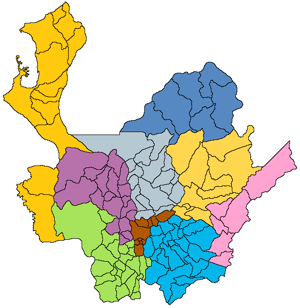 Regiones del departamento de Antioquia Bajo Cauca Magdalena Medio Nordeste Norte Occidente Oriente Suroeste Urabá Valle de Aburrá